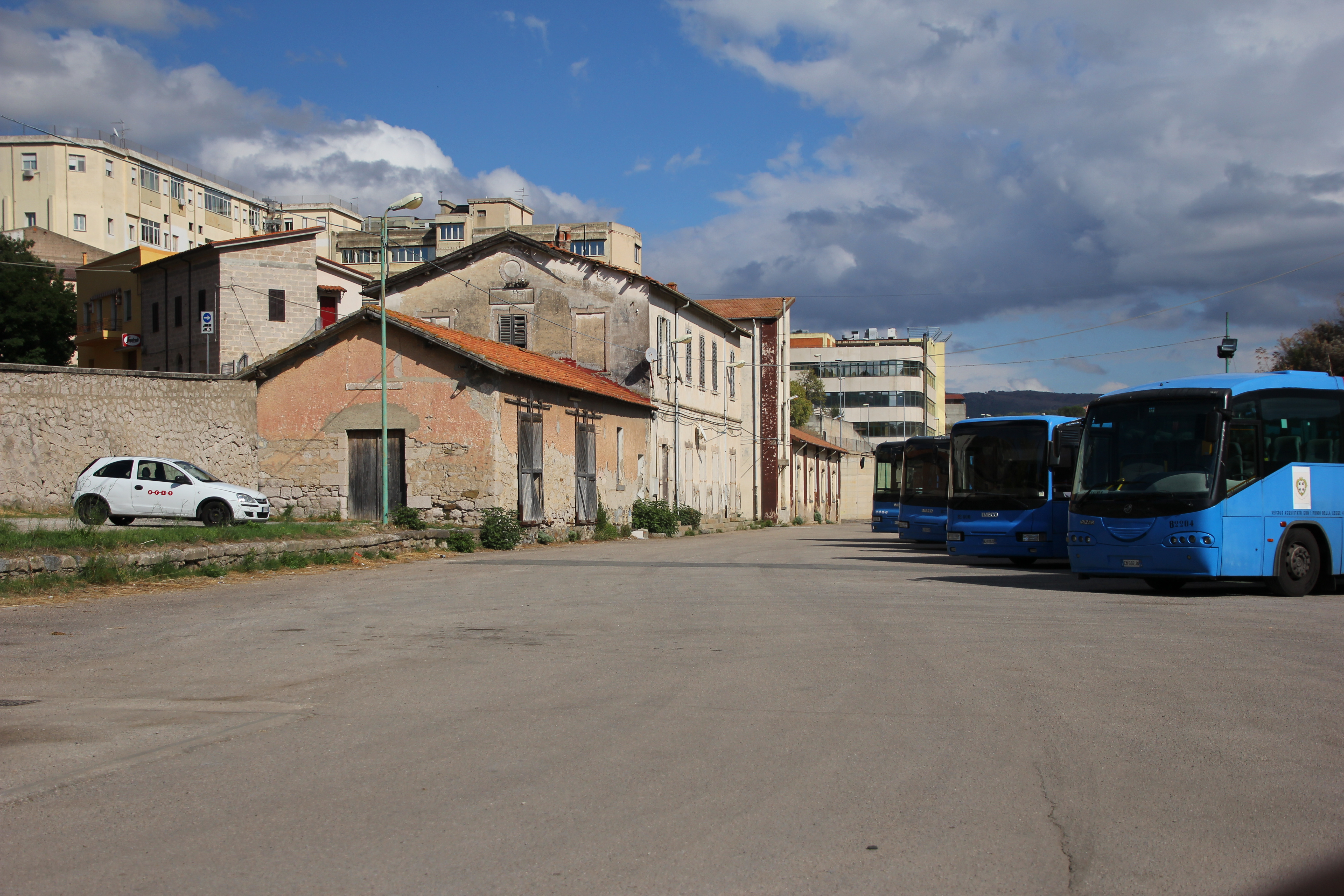 Ozieri - La vecchia stazione ferroviaria